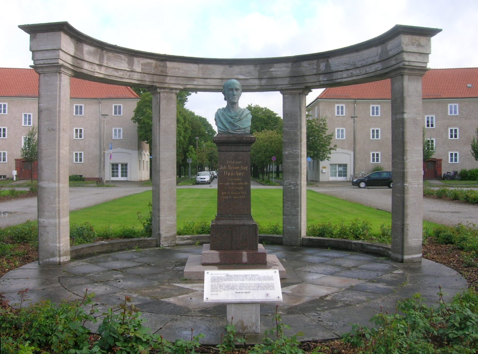 Denkmal für Johann Heinrich August Duncker, den Begründer der optischen Industrie in Rathenow in Brandenburg, bronze-bust by Alexander Calandrelli 1885